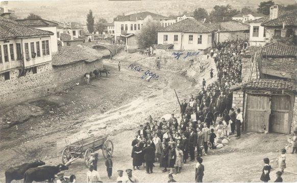 Траурен марш след убийството на Тодор Александров в Кърджали на 18 септември 1924 година.